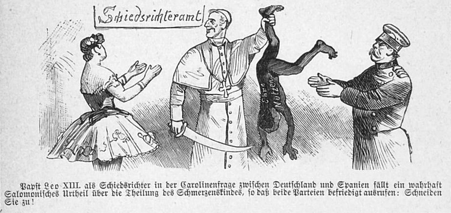 Karikatur zum Streit Deutschlands und Spaniens um die Karolinen aus dem humoristisch-satirischen Wochenblatt Kladderadatsch vom 27. Dezember 1885.